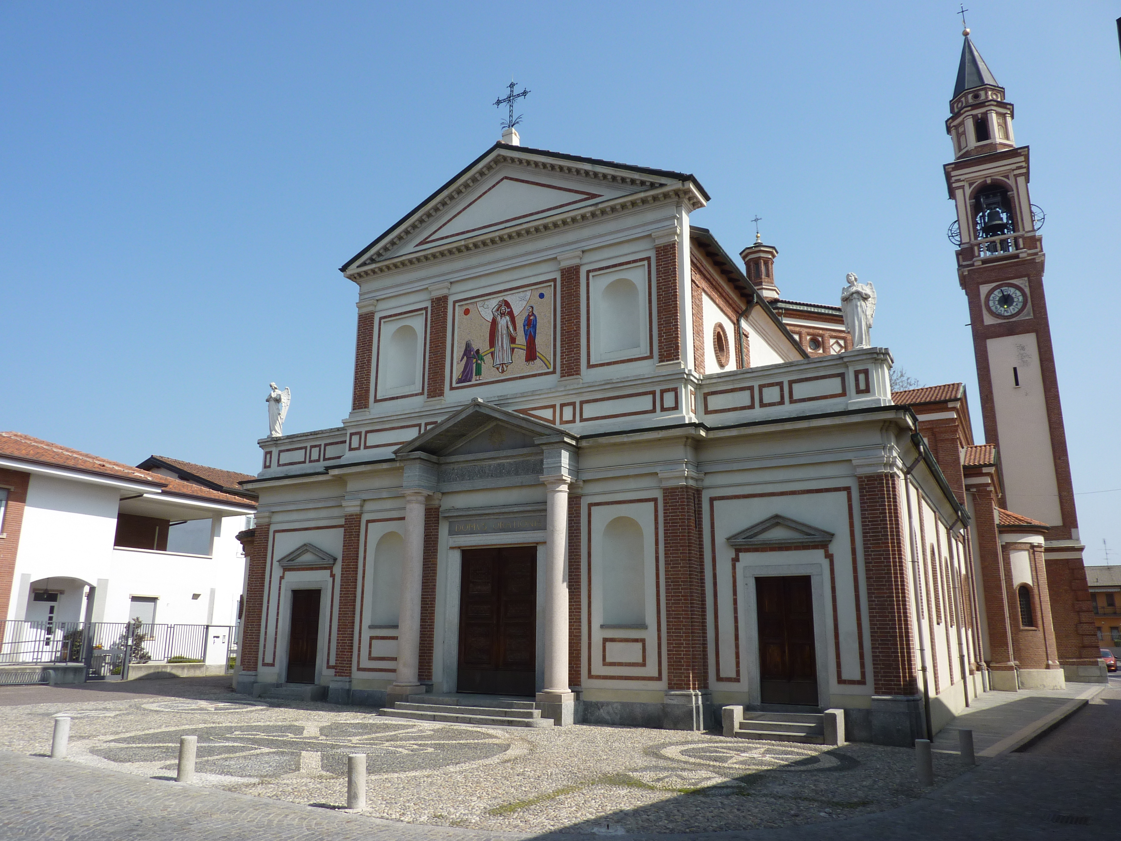 Solaro, la chiesa parrocchiale dei Santi Quirico e Giuditta.